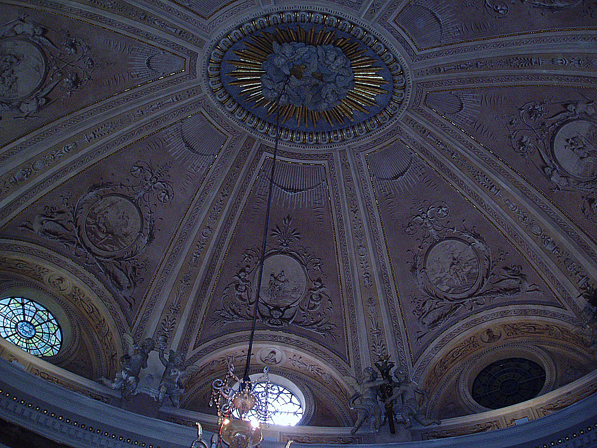 Oratorio de la Santa Cueva de Cádiz. Detalle.